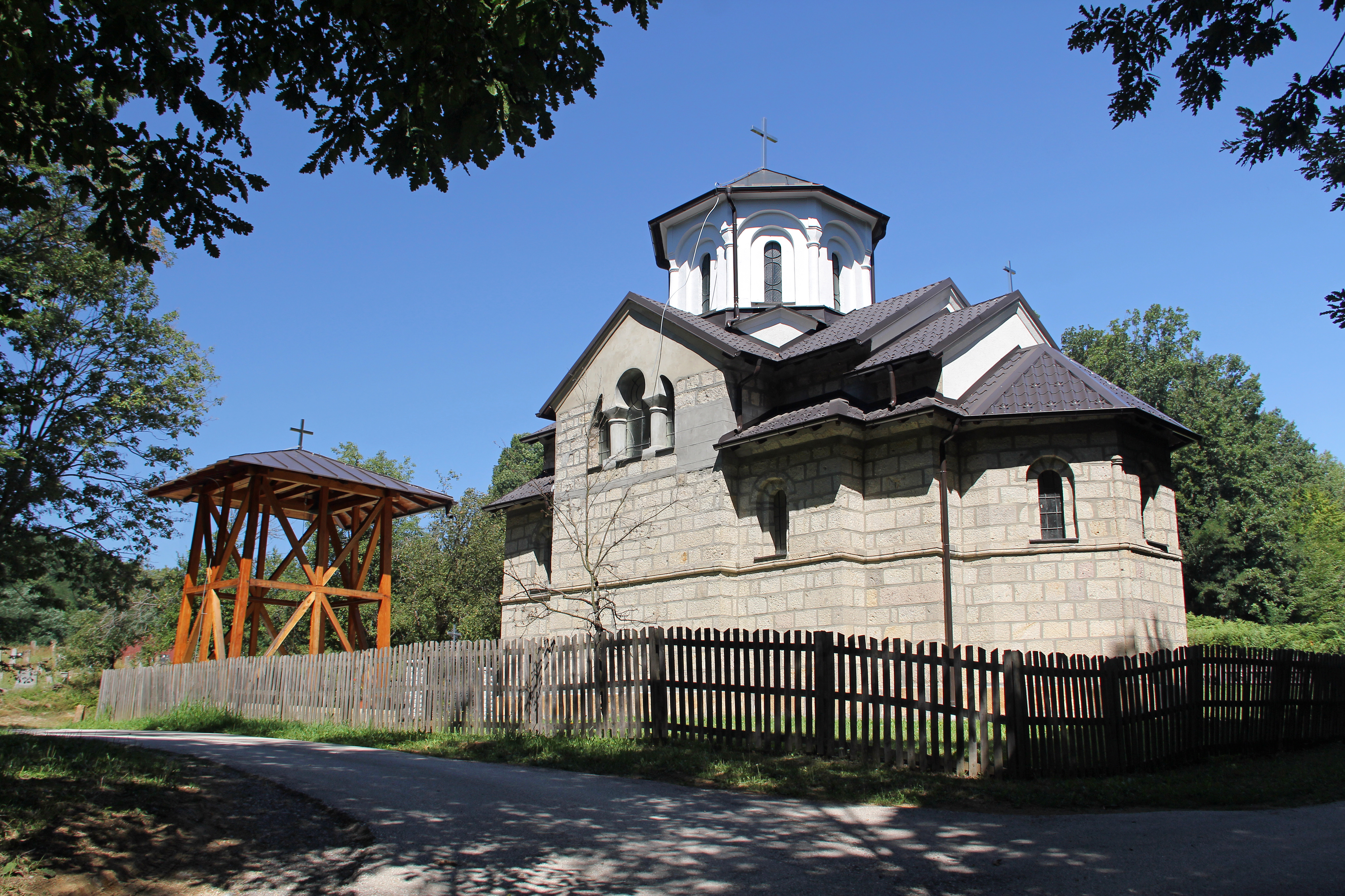 Donji Branetići kod Gornjeg Milanovca, Crkva Svetog Jovana Krstitelja (Jovanjica)